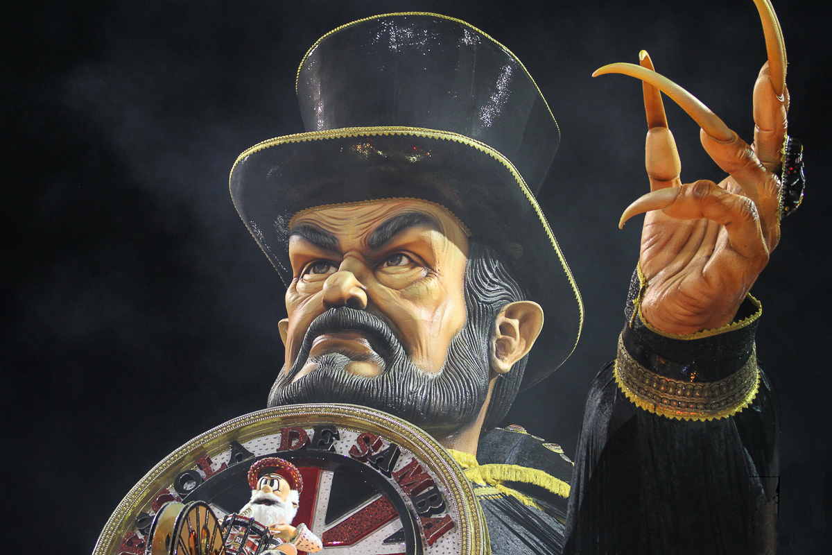 Independente Tricolor